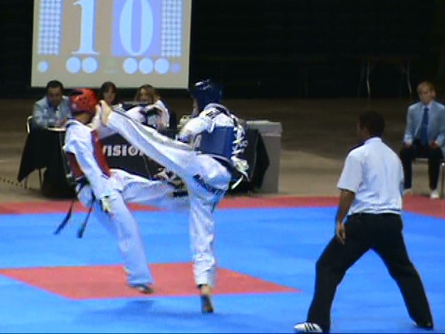 Argentina acierta un golpe a la cabeza de EE.UU., el cual no es computado.